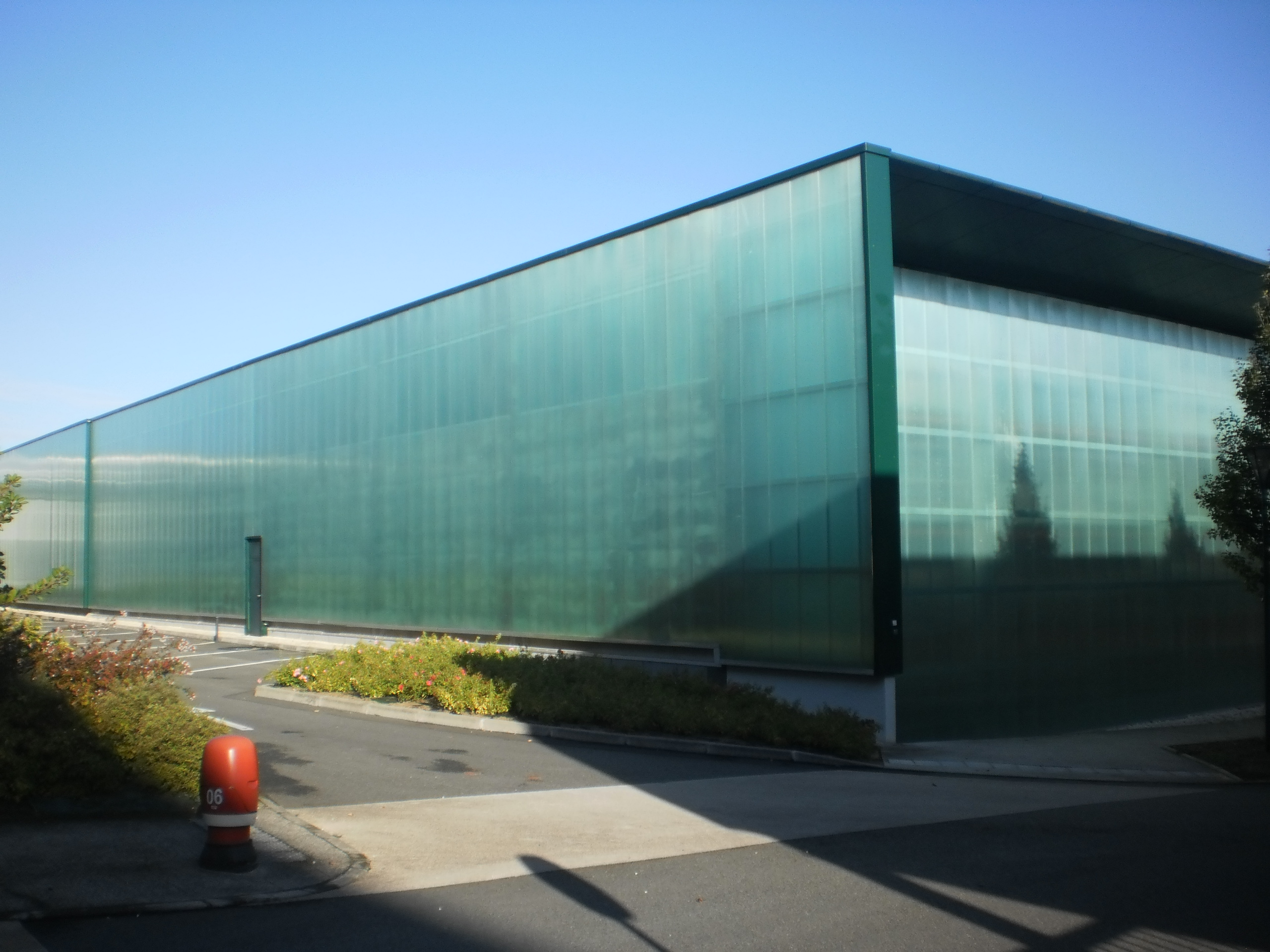 Bâtiment moderne de l'hôpital Saint-Jacques de Nantes (France)